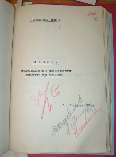 АП РФ, оп.24, дело 410, лист 189. Список лиц, подлежащих суду Военной коллегии Верховного суда Союза ССР от 10 августа 1937 года (с именем Алексея Шпагина) за подписью Сталина, Ворошилова, Молотова и Кагановича.